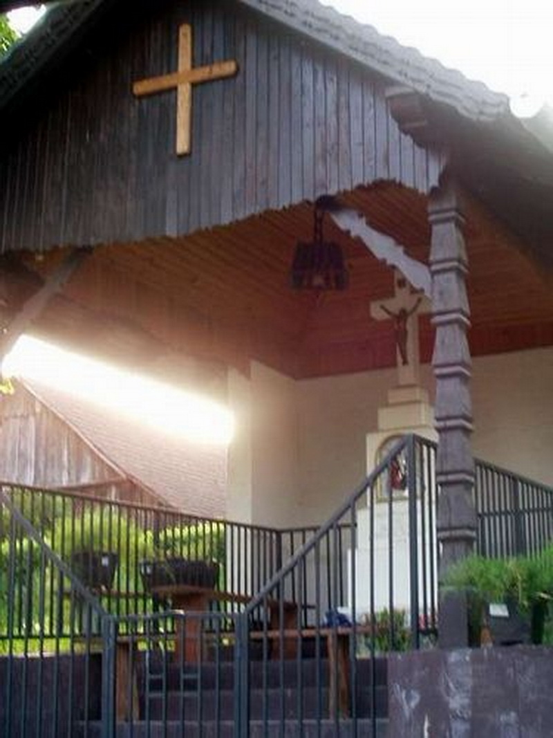 Repinec - Semi Chapel